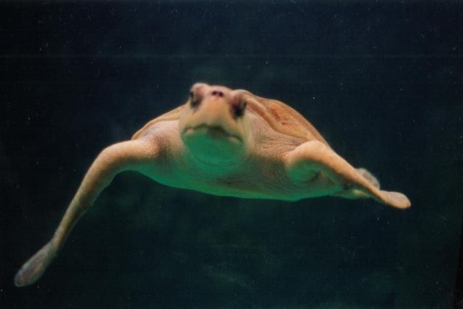 Tortuga en el acuario Mazunte en Oaxaca México.